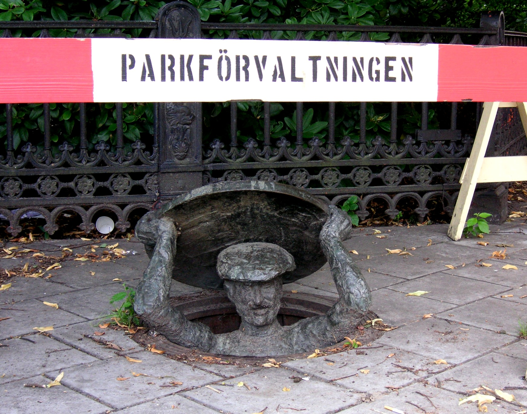 Karl Göte Bejemarks skulptur "Humor" 1967 in Stockholm beim Nybroplan.